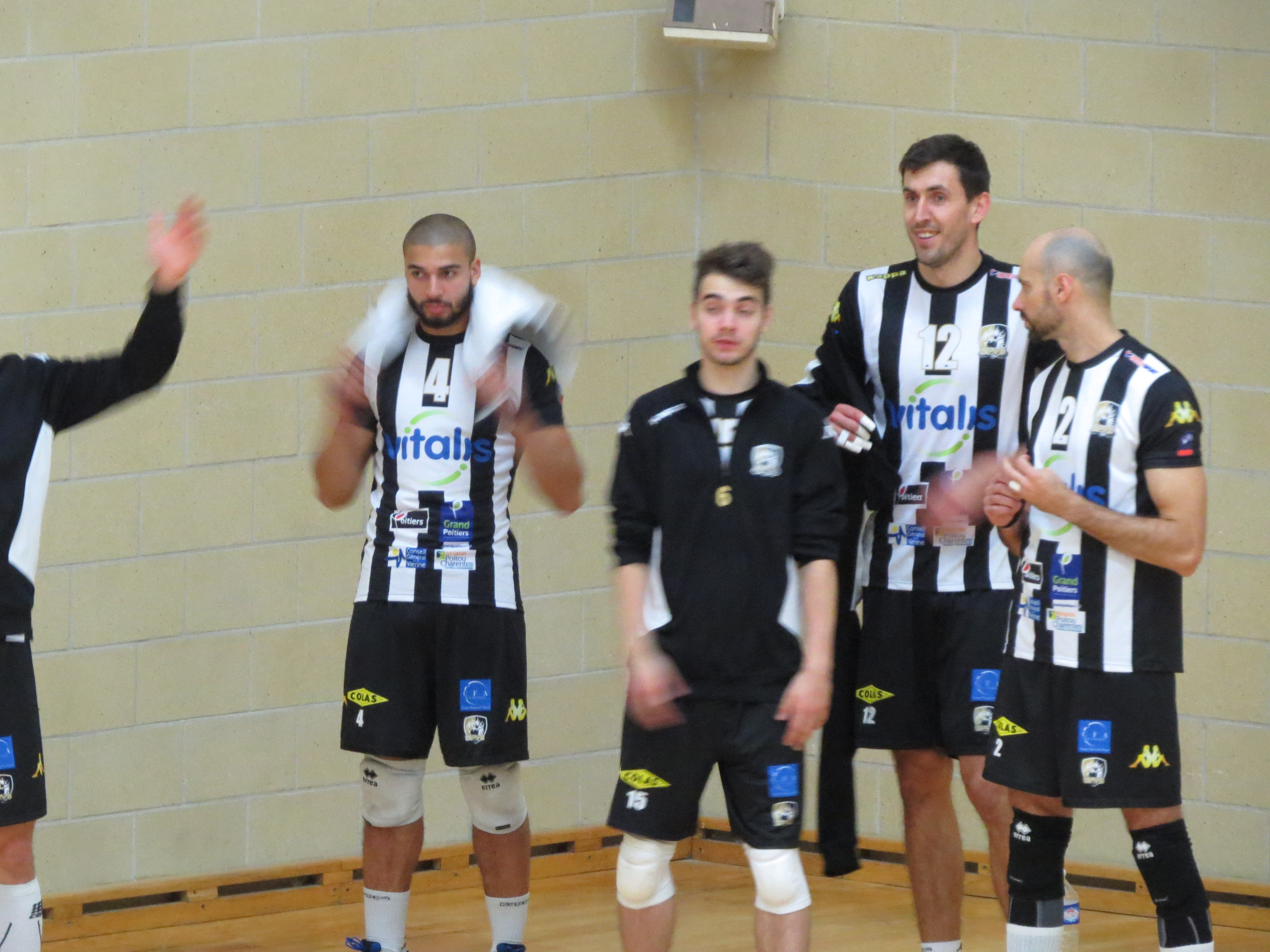 Match entre le Plessis-Robinson Volley-ball et le Stade poitevin volley beach - LBM - 13 novembre 2014 4:NGAPETH Swan 15:Artem Korovyanskyy 12:SABLJAK Matija 2:BRIZOLA DAMASCENO Rogerio